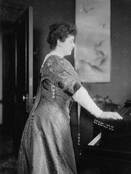 Emma Eames (1865 - 1952), opera soprano